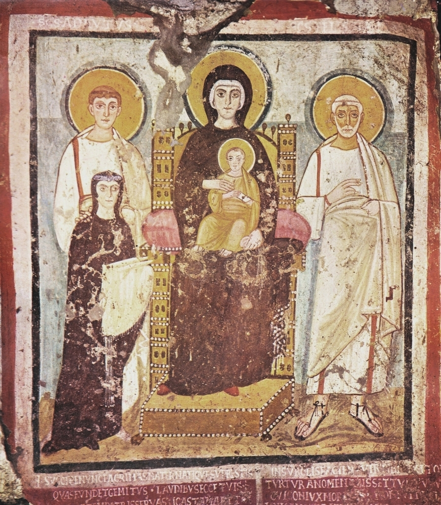 La Vergine Nikopoia, i Santi Felice e Adaucto e la donatrice Turtura, 528 Materiali: affresco Collocazione: Catacomba di Commodilla, Roma